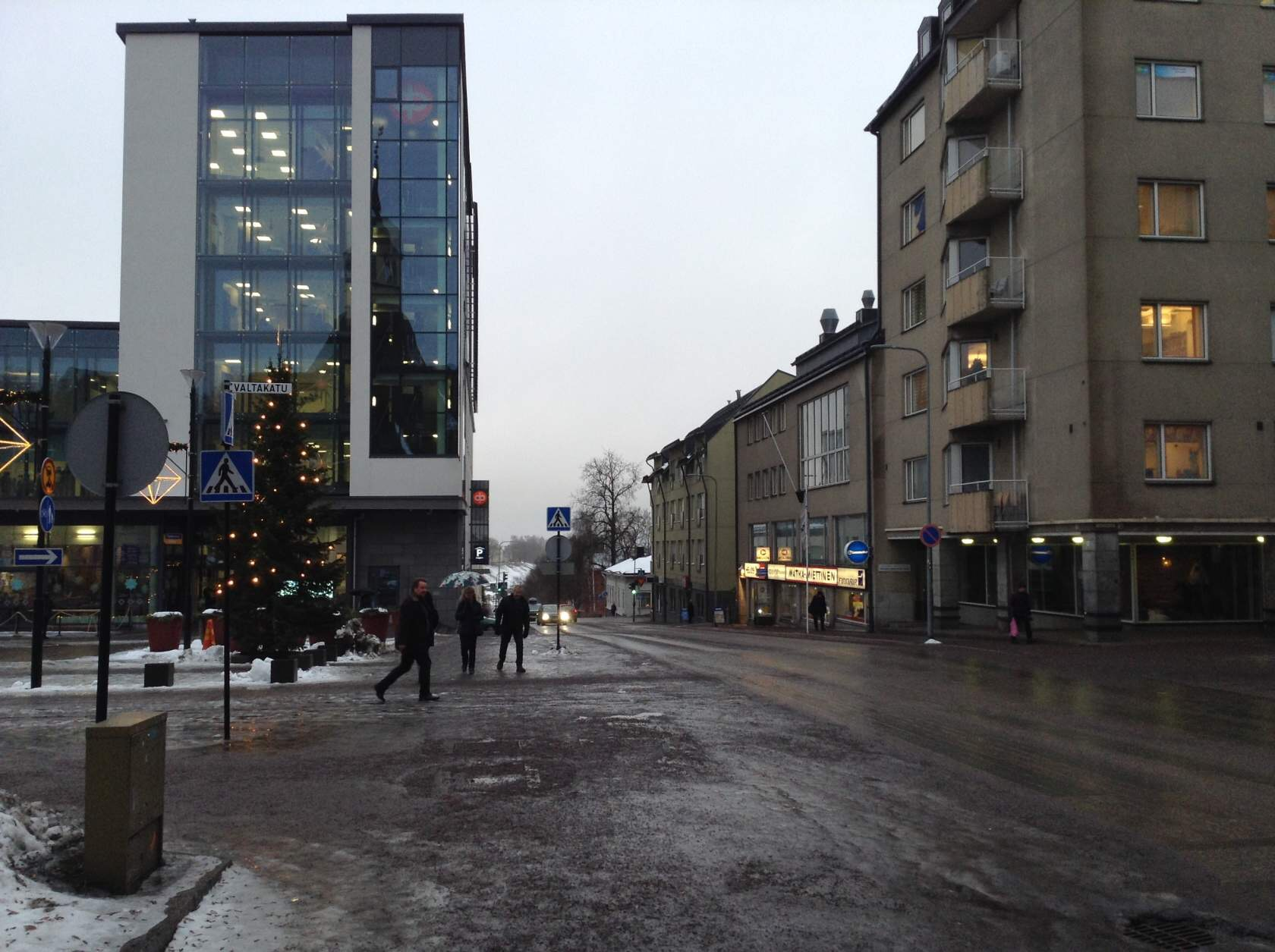 One of the streets of Lappeenranta